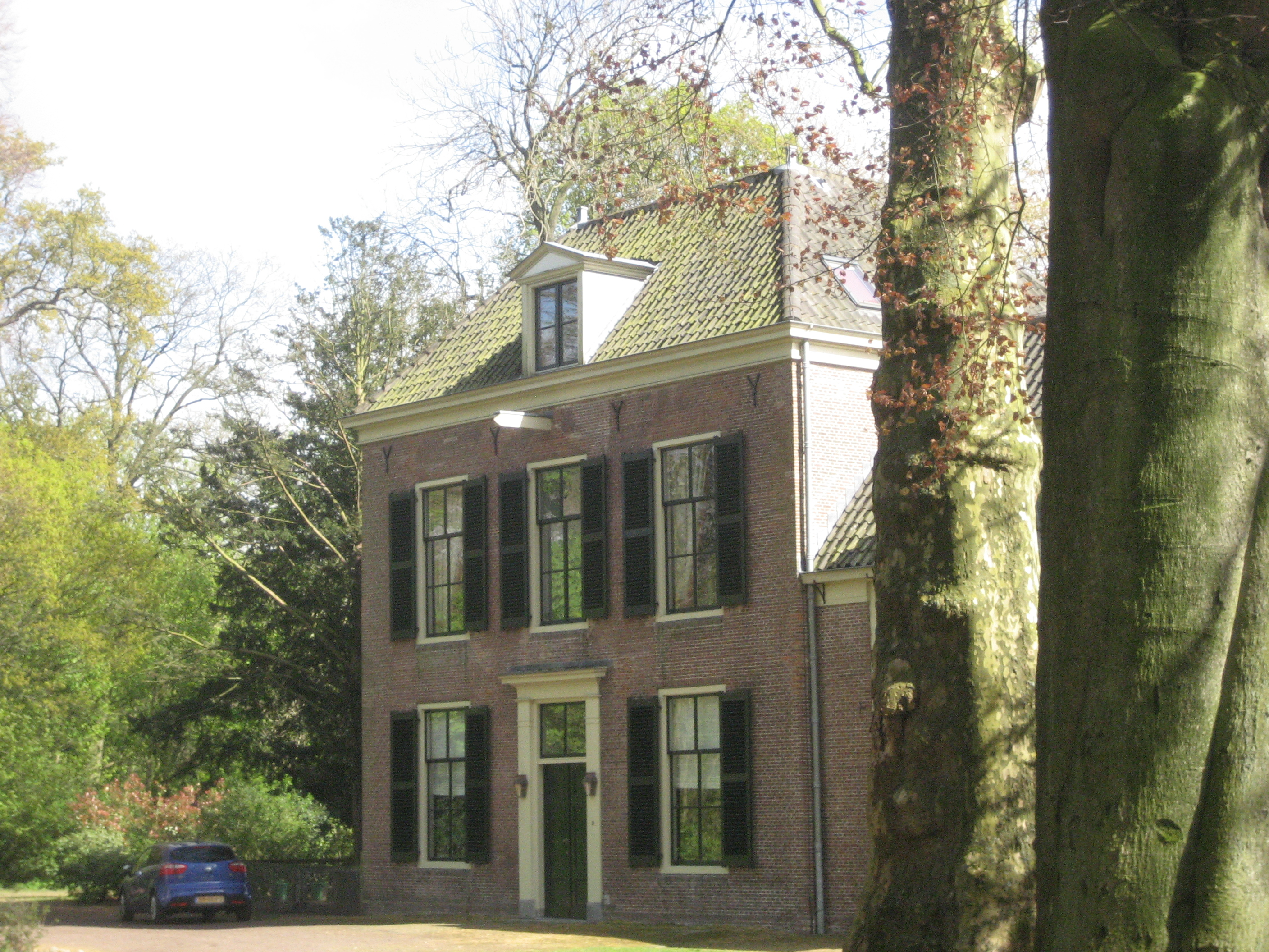 Landgoed De Horsten, Wassenaar/Voorschoten. Huize Raephorst